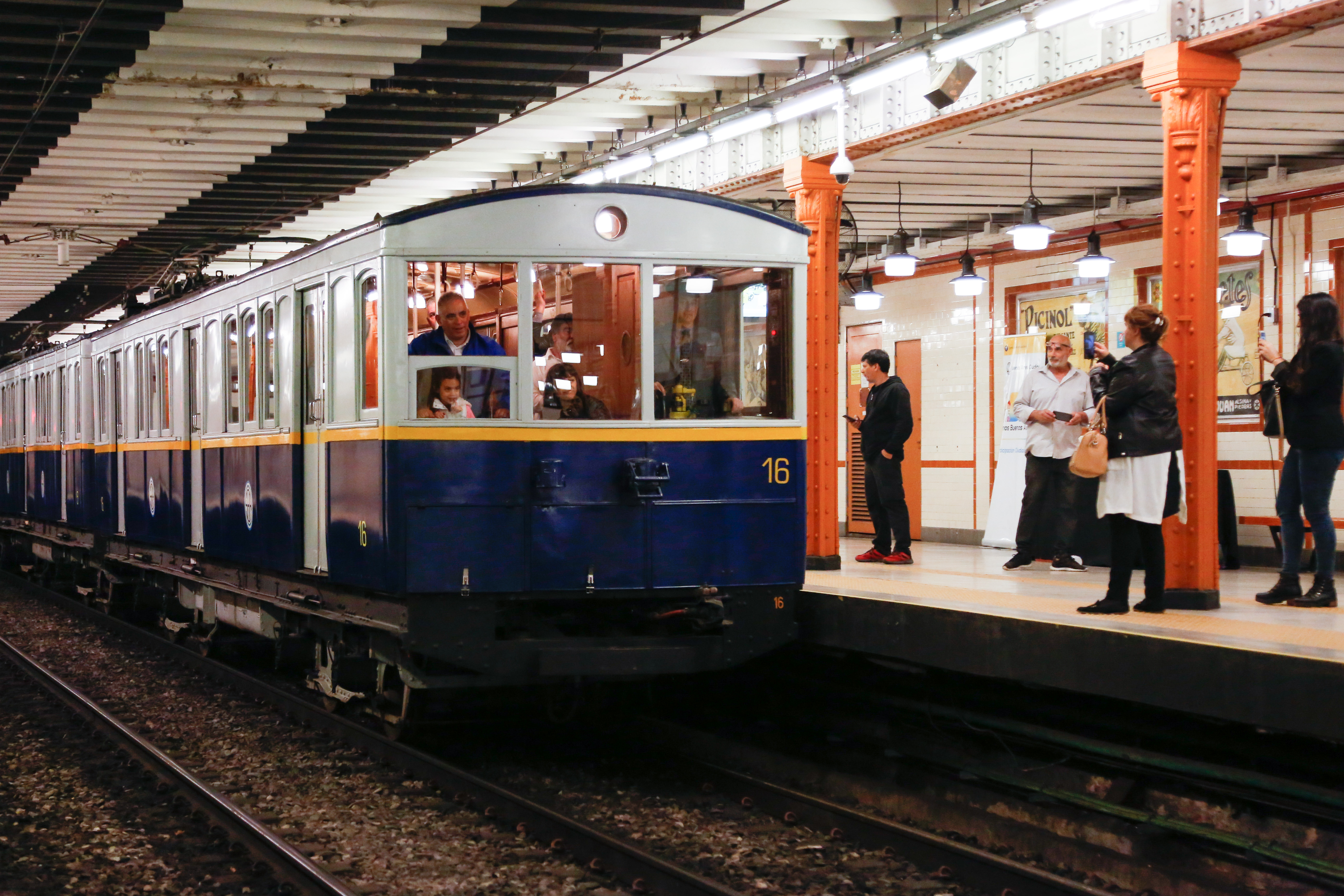 Primer paseo en los coches históricos La Brugeoise.